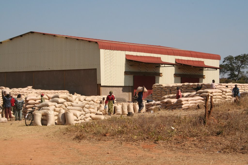 a-maize-ing-Zambia